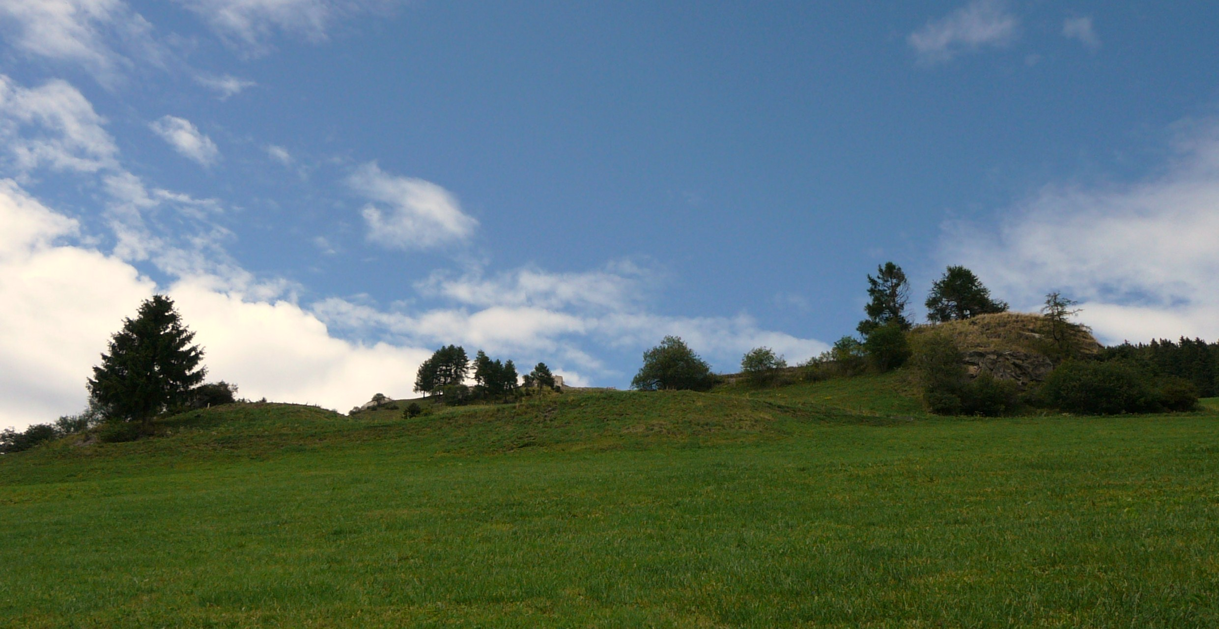 Ai lati l'opera 8, e sullo sfondo l'opera 9 dello sbarramento di Dobbiaco